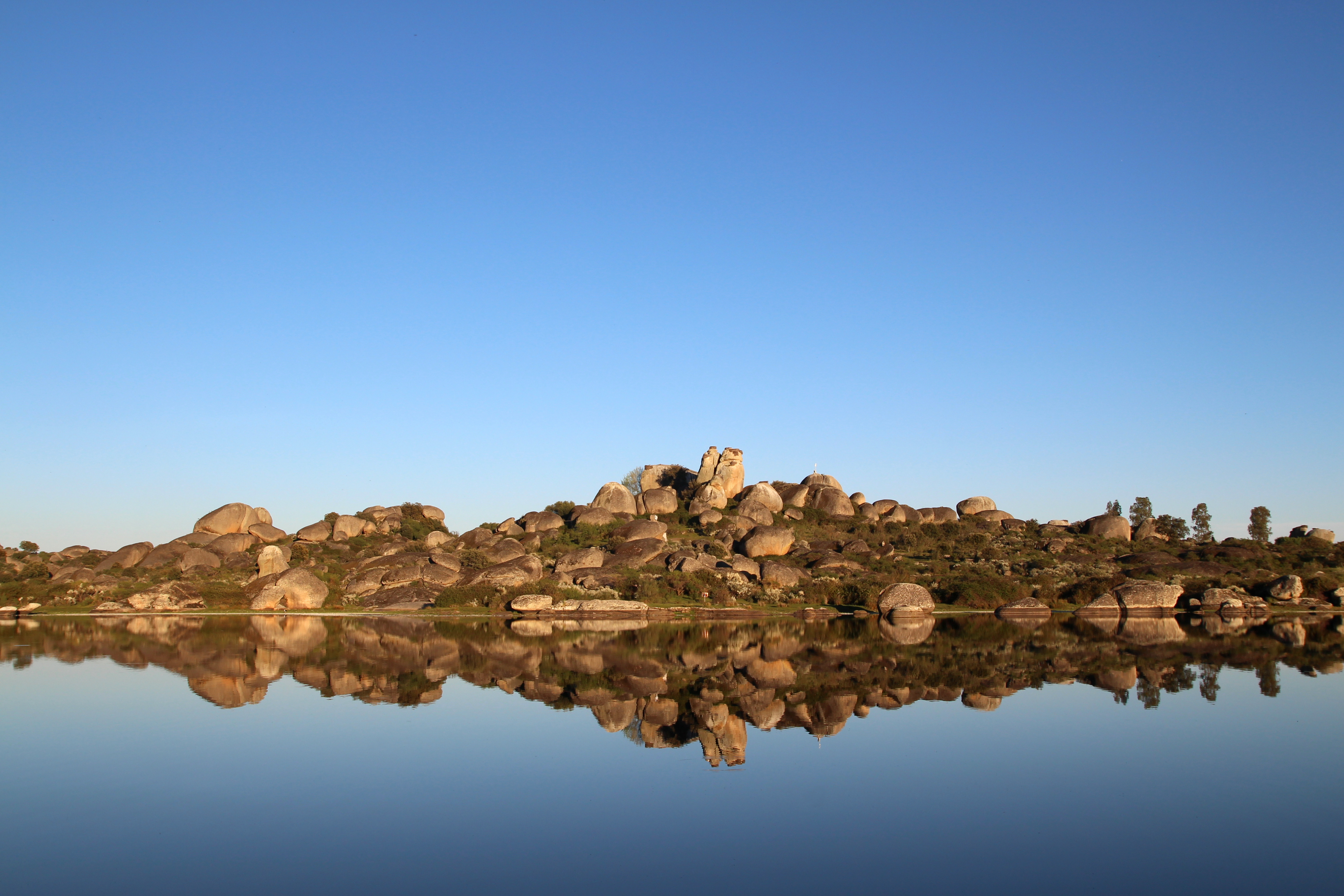 Los Barruecos